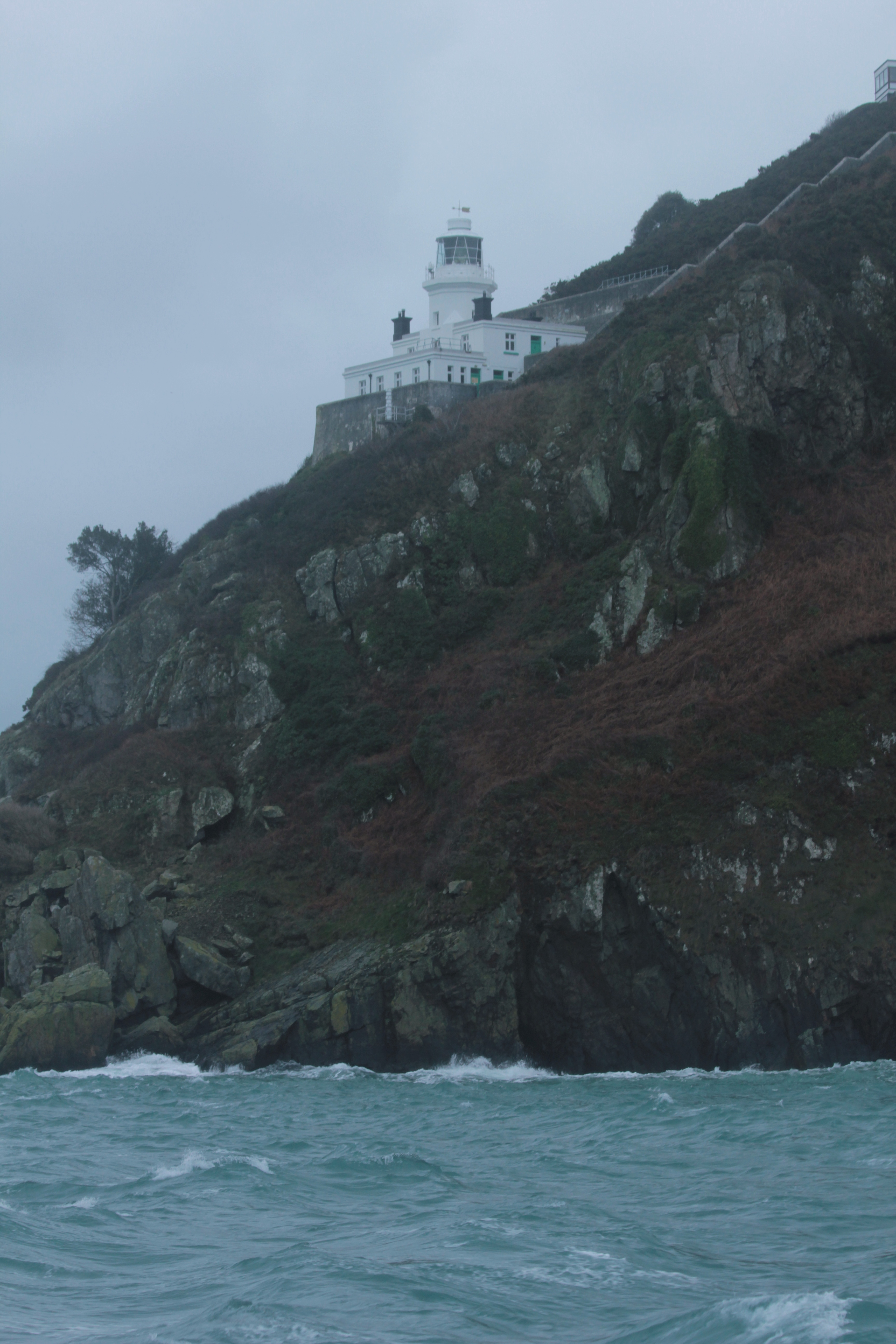 Fotografía del Faro de la Isla de Sark desde el ferry de Sark a Guernsey